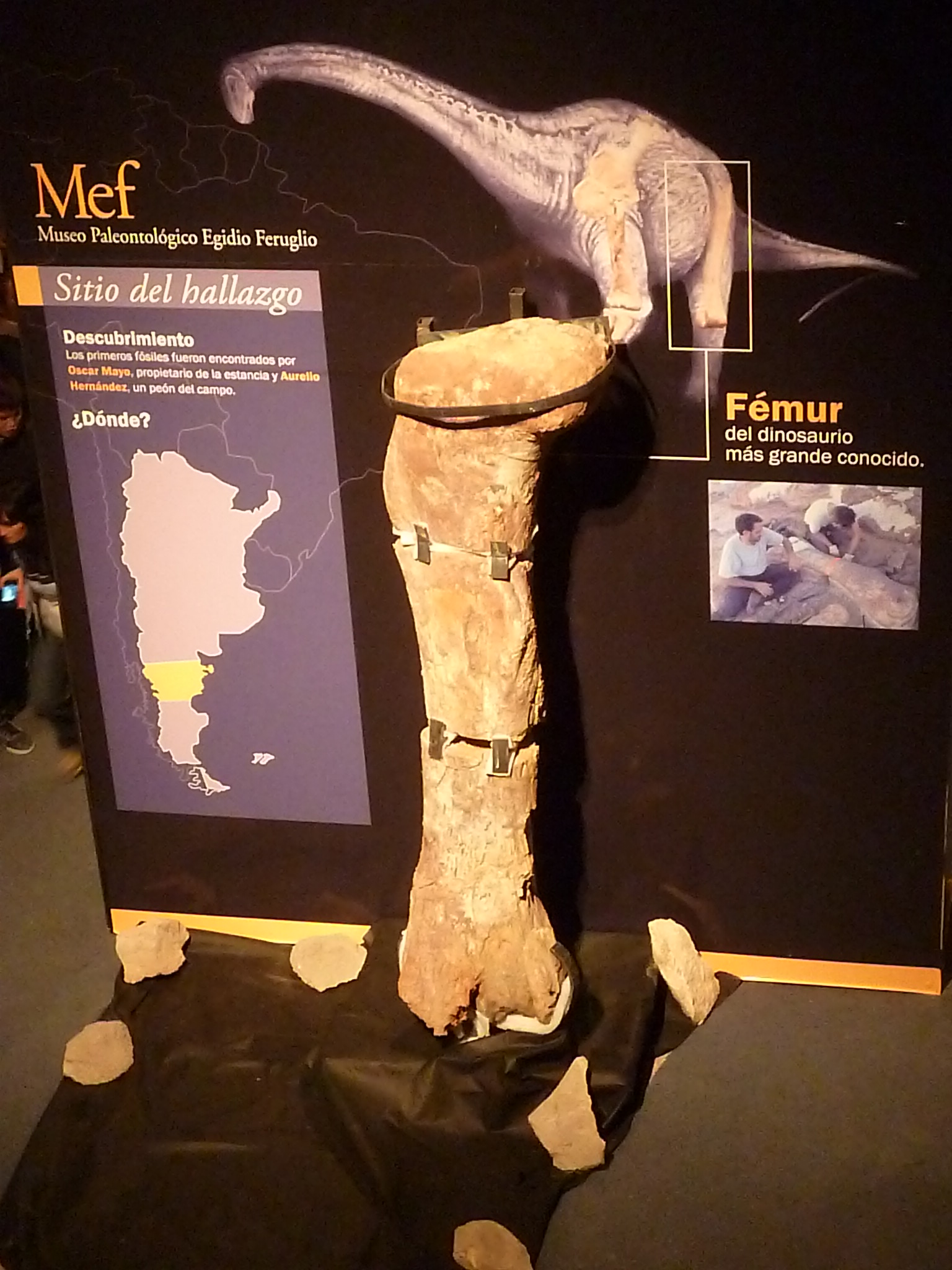 Fósiles del titanosauria del Chubut en el Museo Egidio Feruglio de Trelew, Chubut, Argentina. Descubiertos en 2013 y presentados en 2014, supuestamente se trata del animal terrestre más grande de la historia de la Tierra. Pesaría 4 toneladas más que el Argentinosaurus y su fémur mide más de dos metros.